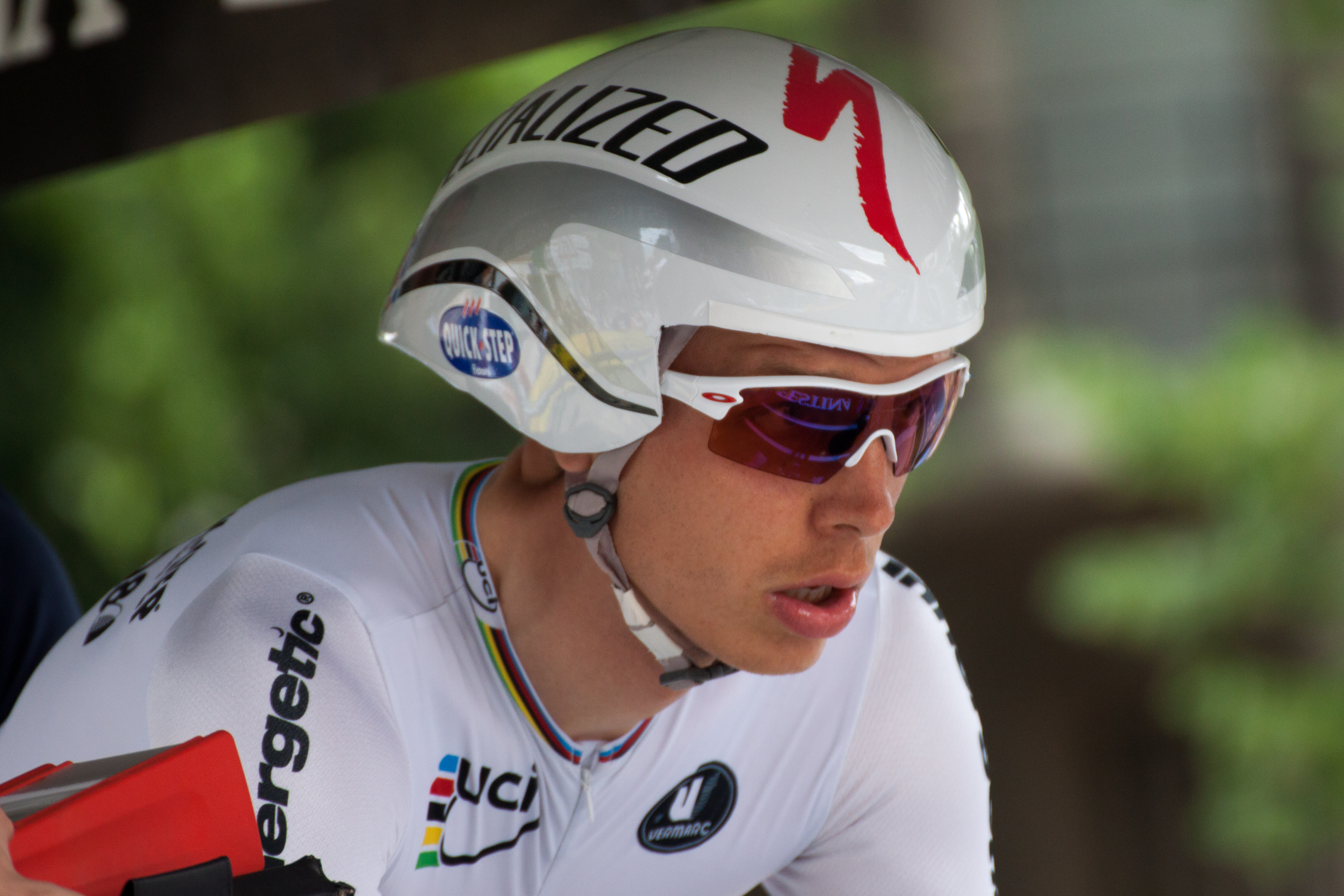 Tony Martin au Prologue du Critérium du Dauphiné 2012